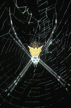 Argiope savignyi from Costa Rica.